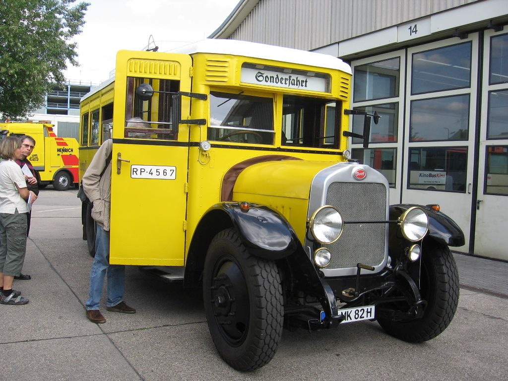 Bus-Ausstellung Betriebshof Frankfurt am Main Rebstock: Historischer Postbus, hergestellt von DAAG im Jahr 1925.